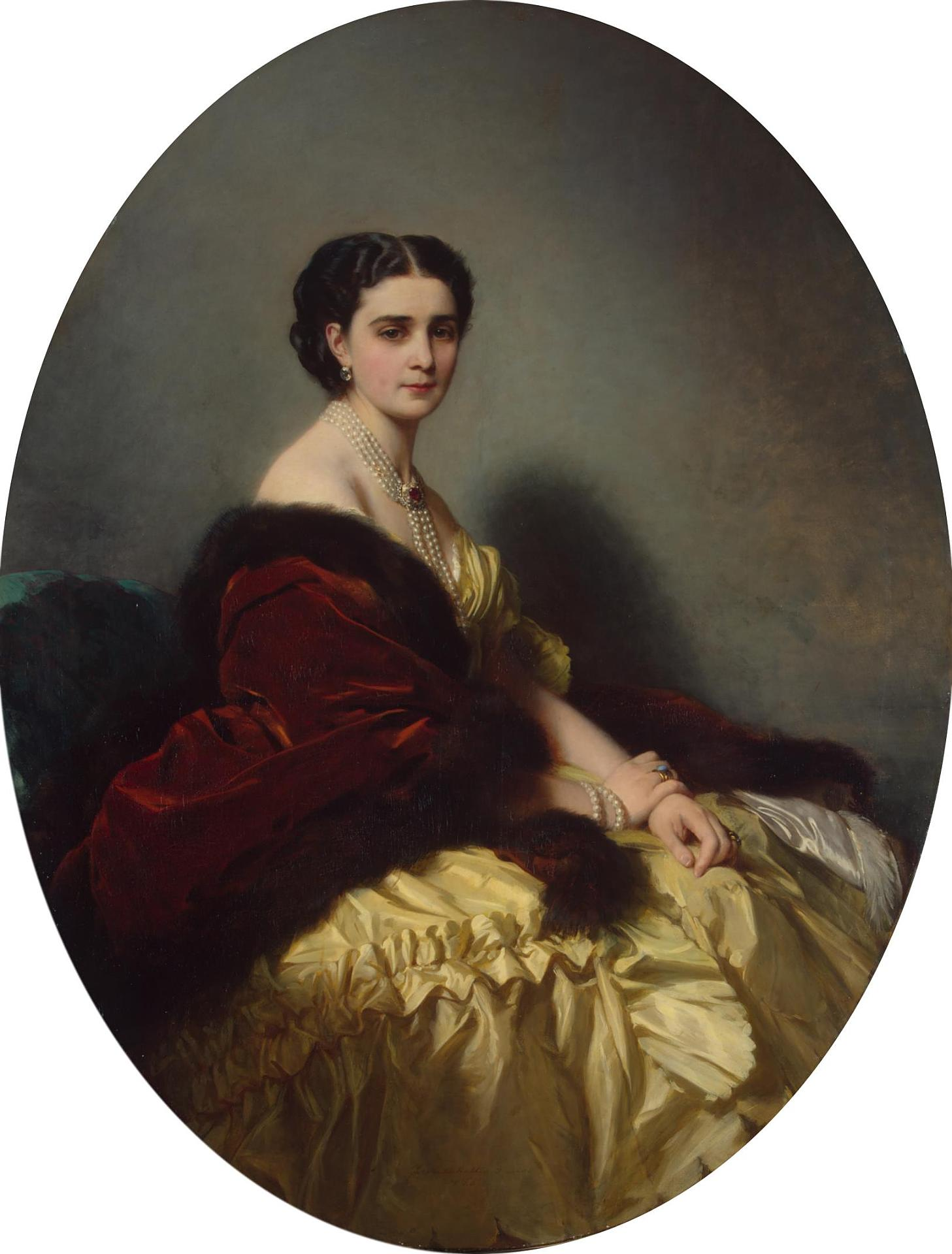 Софья Петровна Нарышкина (урожденная Ушакова) (1823-1877), жена Константина Павловича Нарышкина (1806—1880), благодаря протекции генерала Закревского и богатству мужа, была самой модной московской дамой. Франц Ксавьер Винтерхальтер, живописец немецкого происхождения, был придворным портретистом короля Луи Филиппа и императора Наполеона III. Композиции его портретов отличаются театральностью, а передаче аксессуаров он уделял не меньшее внимание, чем лицам моделей. Софья Петровна Нарышкина (1823-1877), жена камергера Константина Павловича Нарышкина, изображена в эффектном повороте, акцентирующем плавную линию обнаженного плеча. Изящный жест холеных рук, смелое сочетание темно-бордовых и лимонно-желтых тонов одежды придают облику модели претенциозную элегантность.